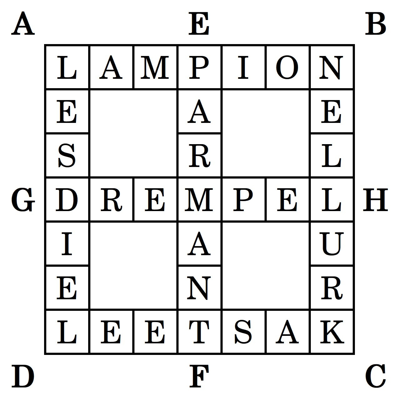 Eerste Nederlandse Kruiswoordpuzzel, verschenen op 20 december1913 in het Algemeen Handelsblad. Onderschrift: "Plaats in de vierkantjes letters, zoodat er te lezen komt van: A-B: Wordt bij feestelijke gelegenheid aangestoken. C-D: een prachtig gebouw. D-A: Ment een voerman mee. C-B: Heeft elk meisje graag in 't haar. Van E-F het woord dat hier ontbreekt: Het kleine ding stapte heel … alleen de school binnen. Van G-H: bevindt zich onder elke deur."